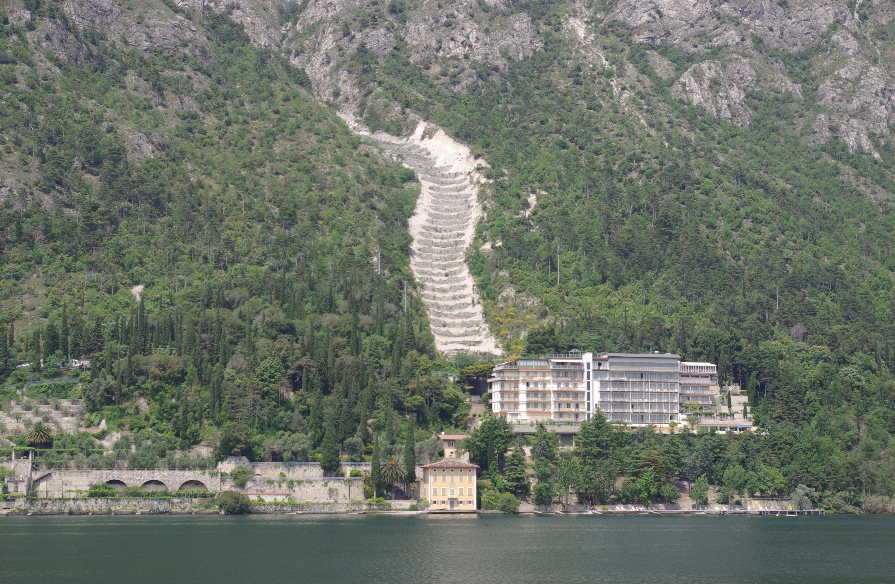 Hotel bei Limone sul Garda und Sperren gegen einen Murgang